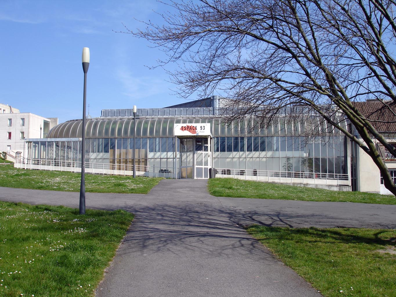 Le centre culturel "Espace 93 à" Clichy-sous-Bois (Seine-Saint-Denis, France).